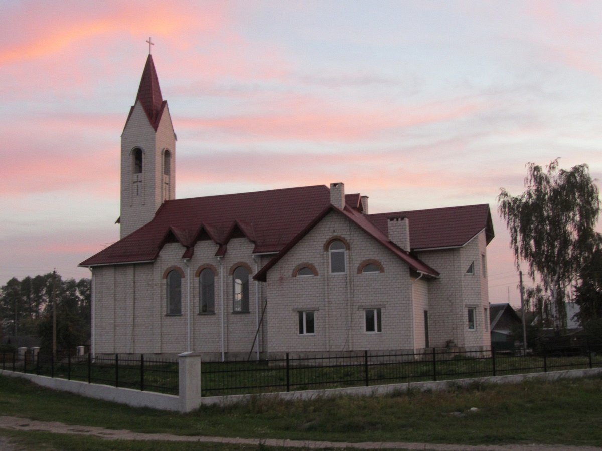 Акцябрскі раён